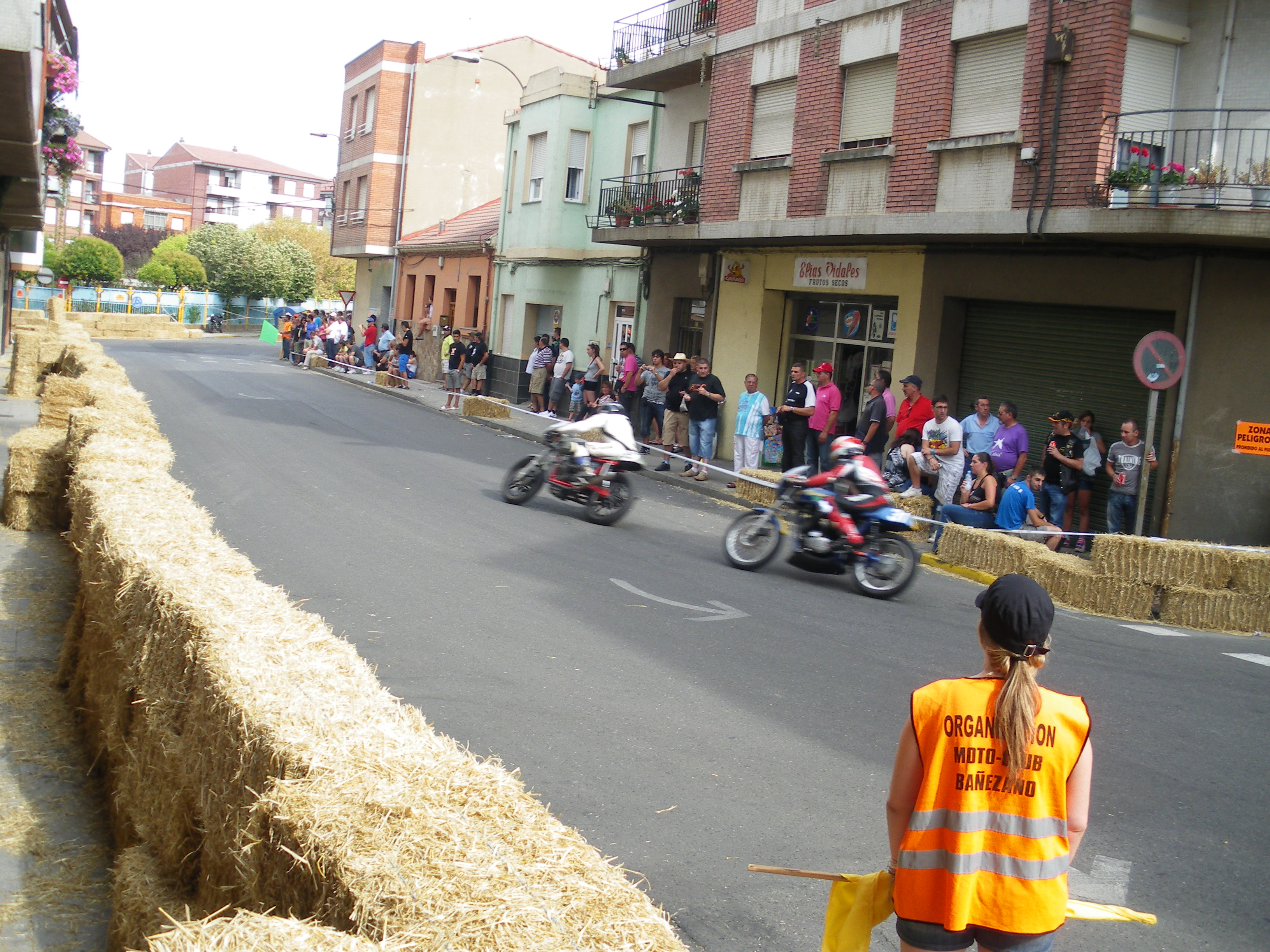 En el 52º Gran Premio de Velocidad de Motos Clásicas de La Bañeza